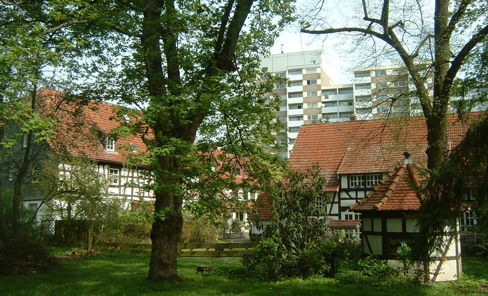 Liederbach am Taunus, ehemalige Untermühle